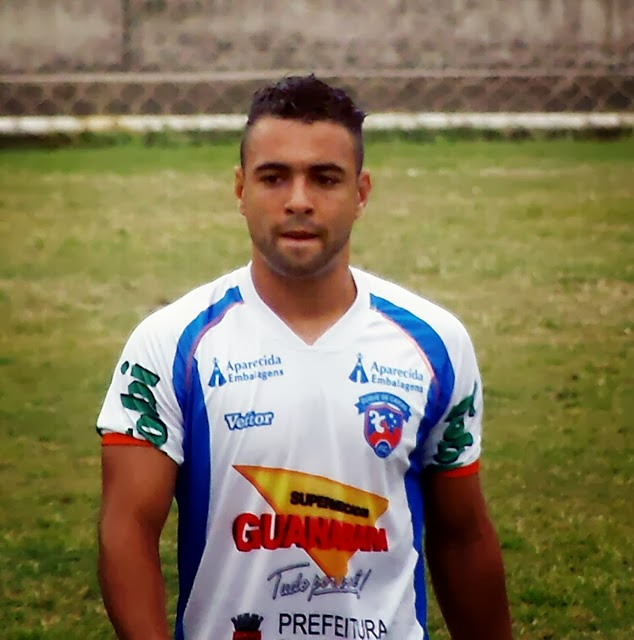 Bruno Veiga